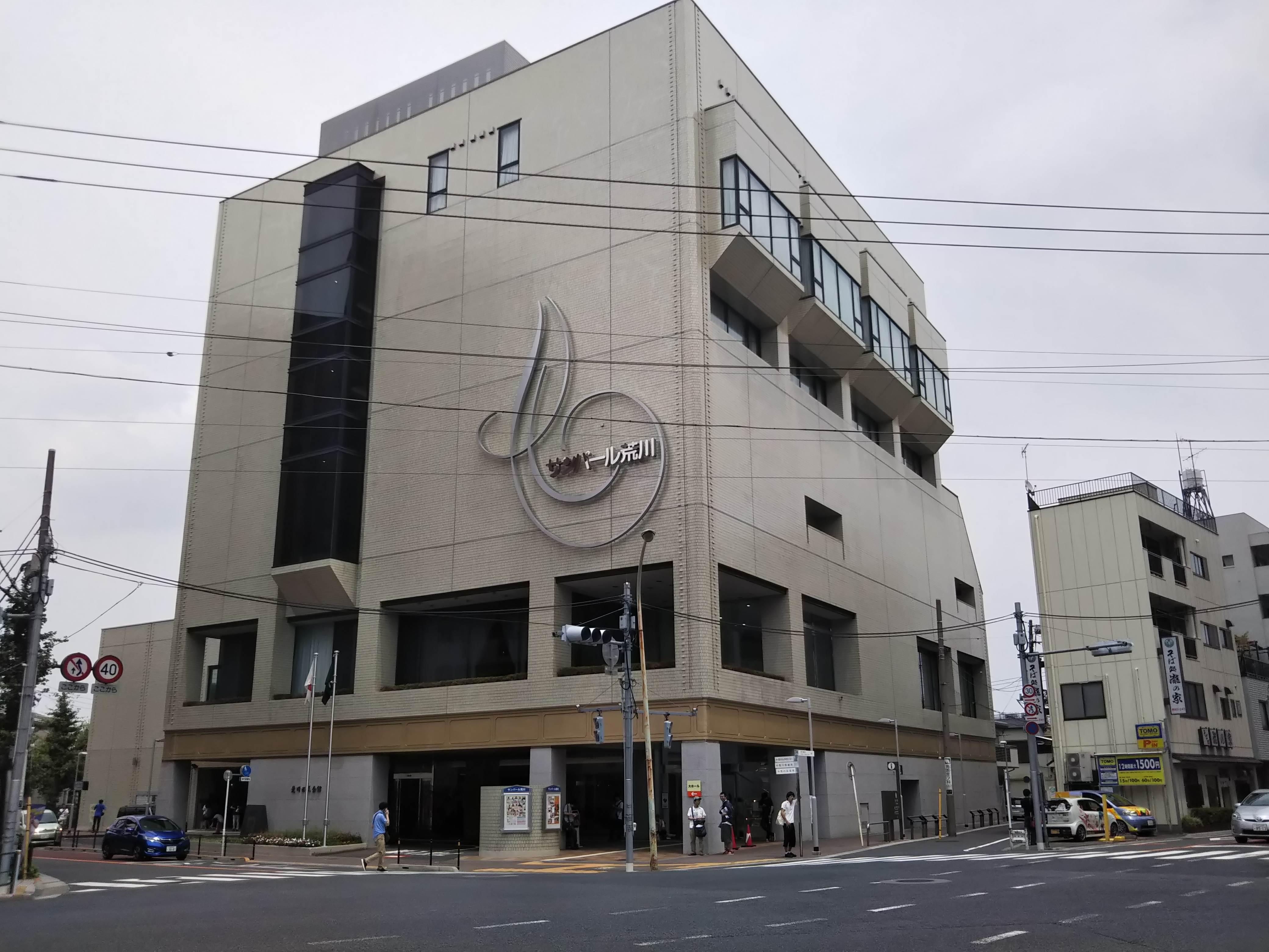 東京都荒川区荒川、荒川区民会館 (サンパール荒川)